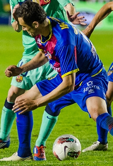 El jugador granota Vicent Iborra